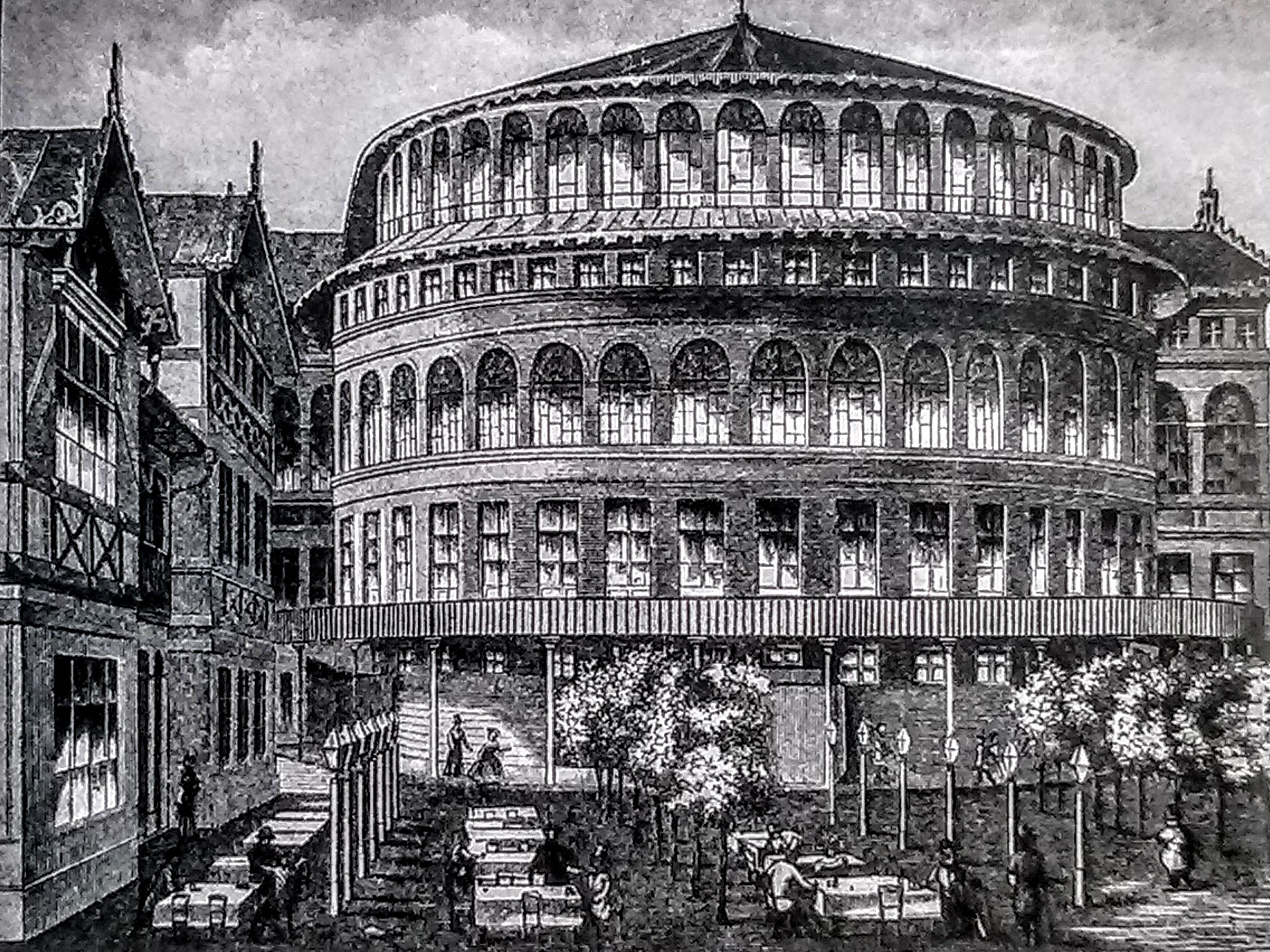 Dobová fotografie divadla z roku 1885, kdy bylo demolováno, aby se uvolnilo místo pro nové, kamenné divadlo - Neues Deutsches Theater.